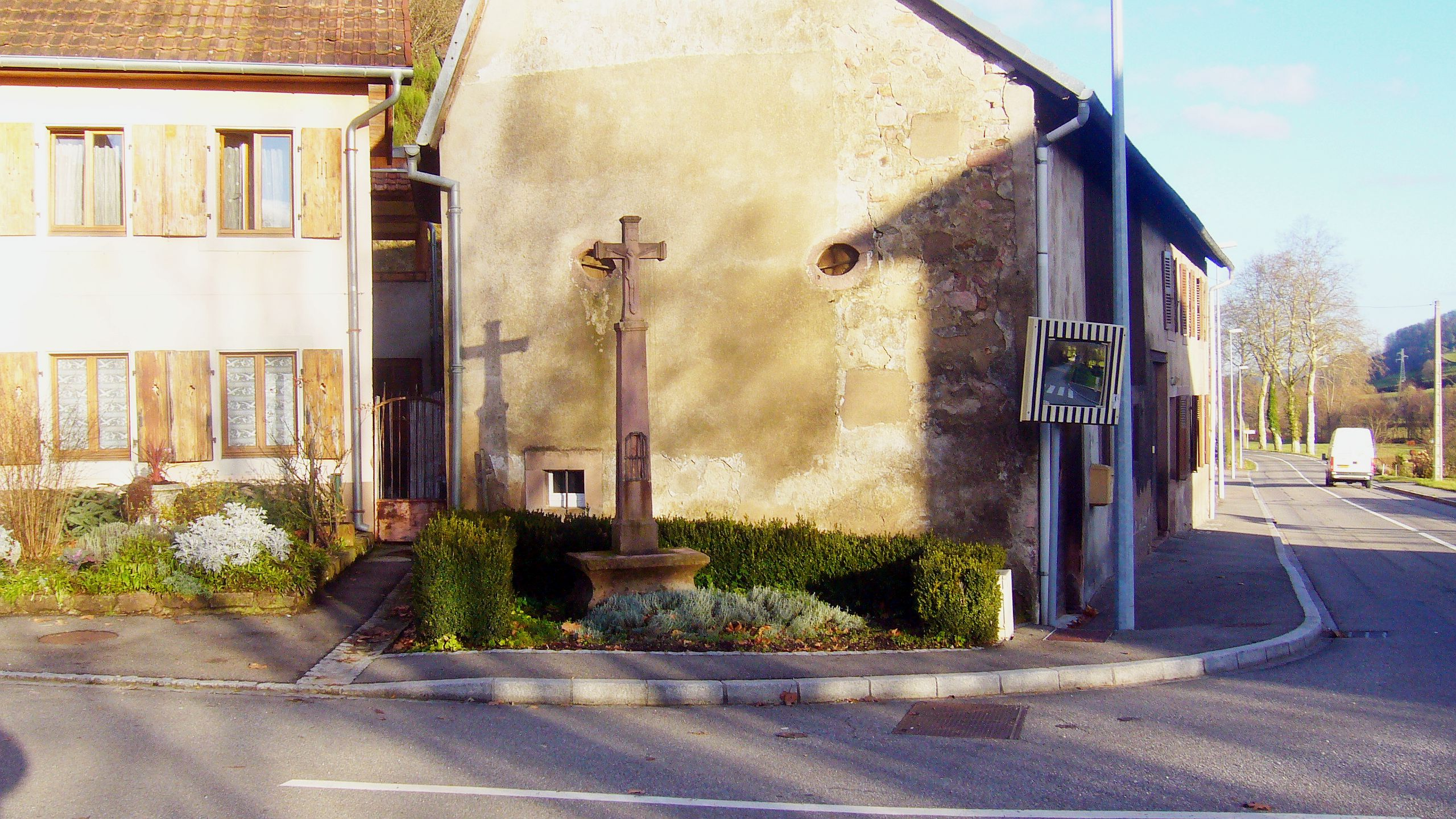 Lièpvre A 014.JPG